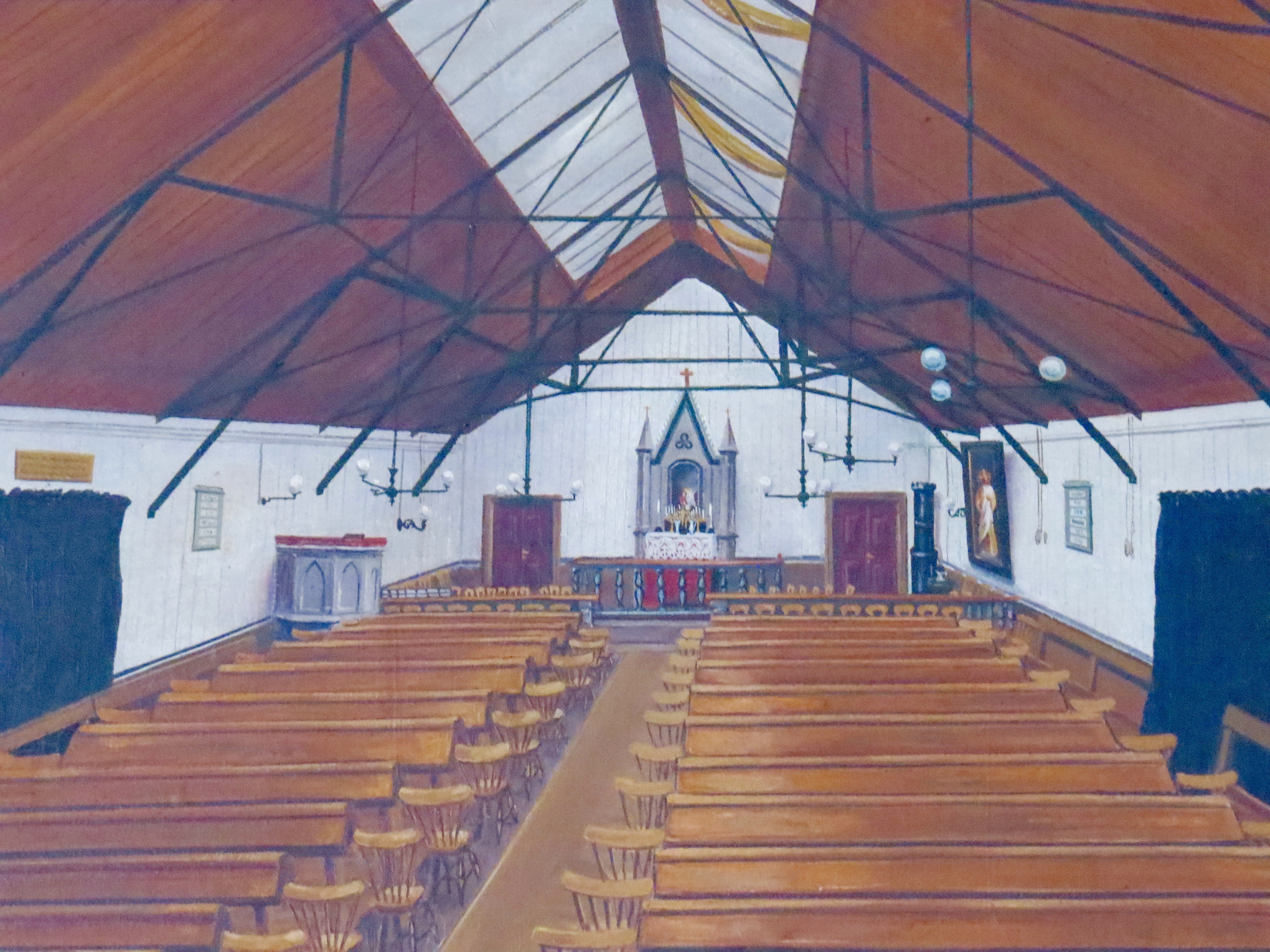 Vandrekirke, maleri fra Simeon Kirke, Nørrebro, København